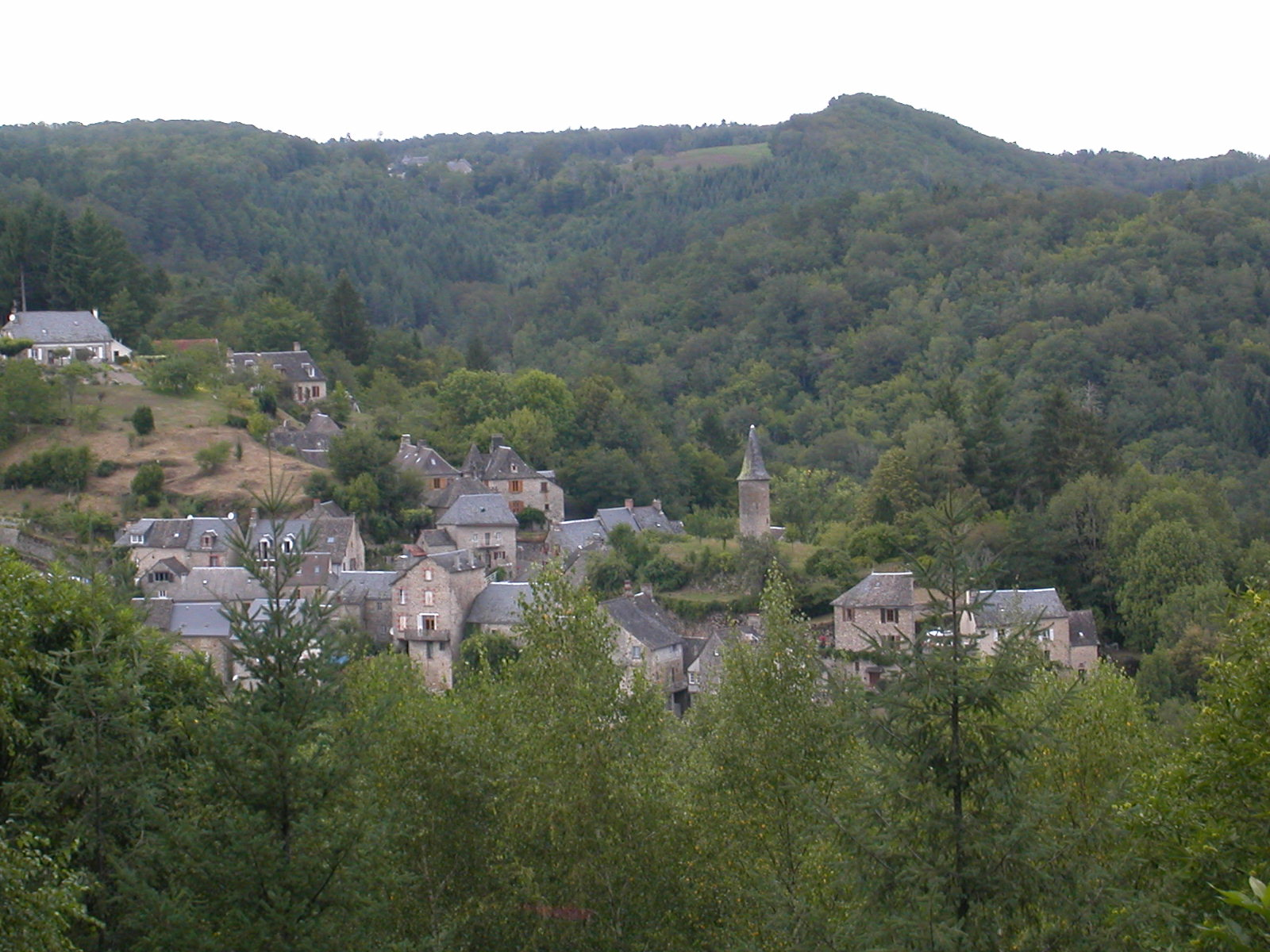 Vue d'ensemble de la Roche Canillac